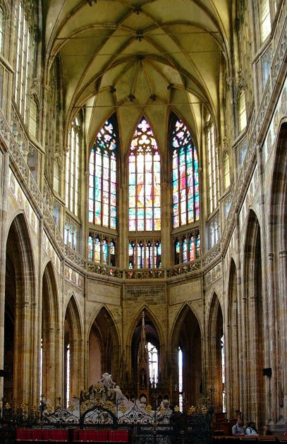 Hochchor des Prager Veitsdoms